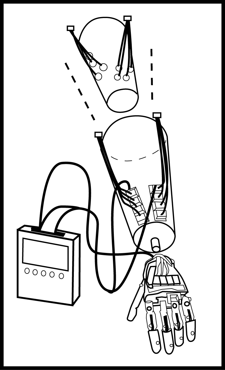 brazo mecánico